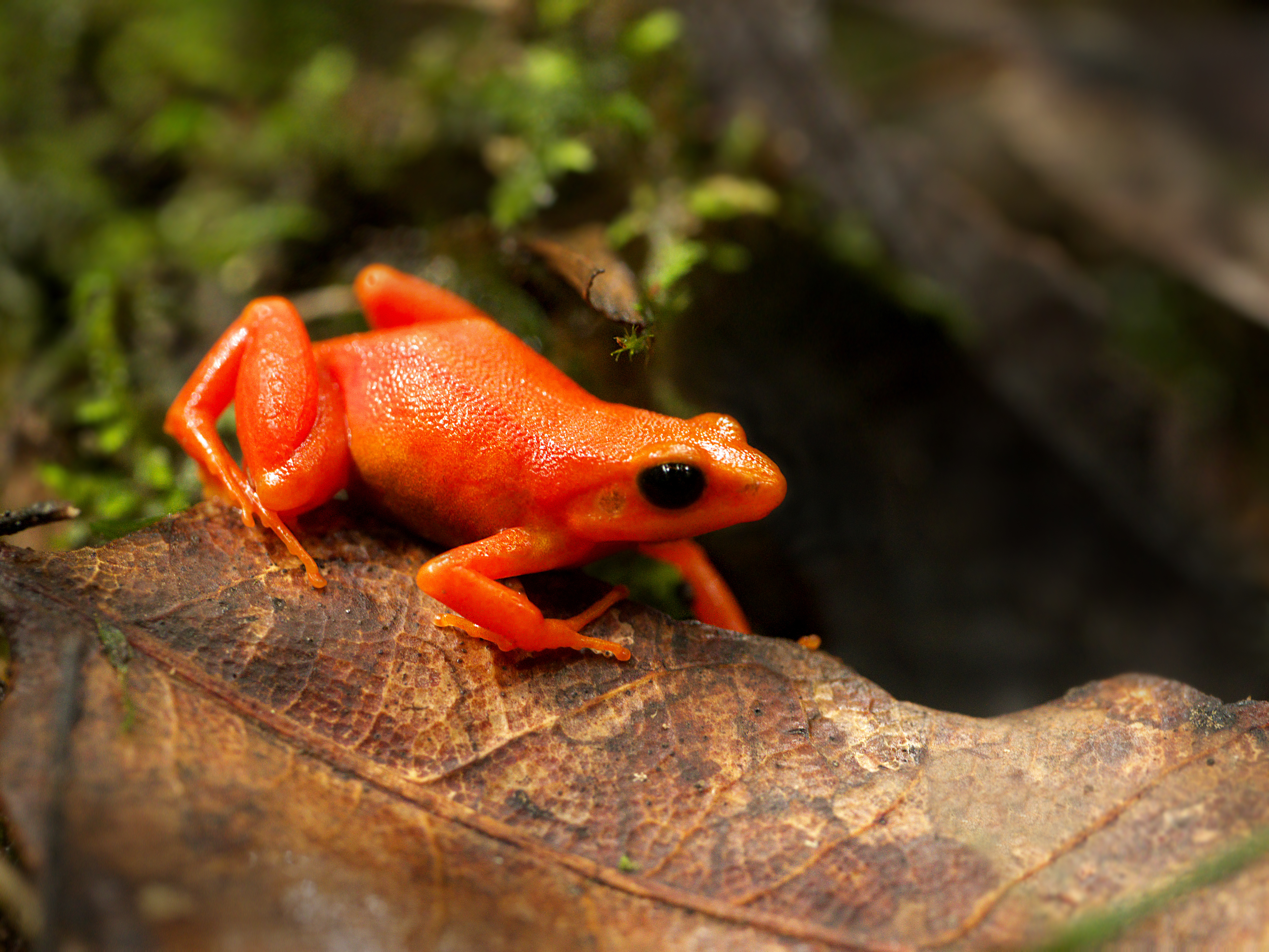 Panasonic GX7 + Leica DG Macro-Elmarit 45mm F2.8 ASPH OIS